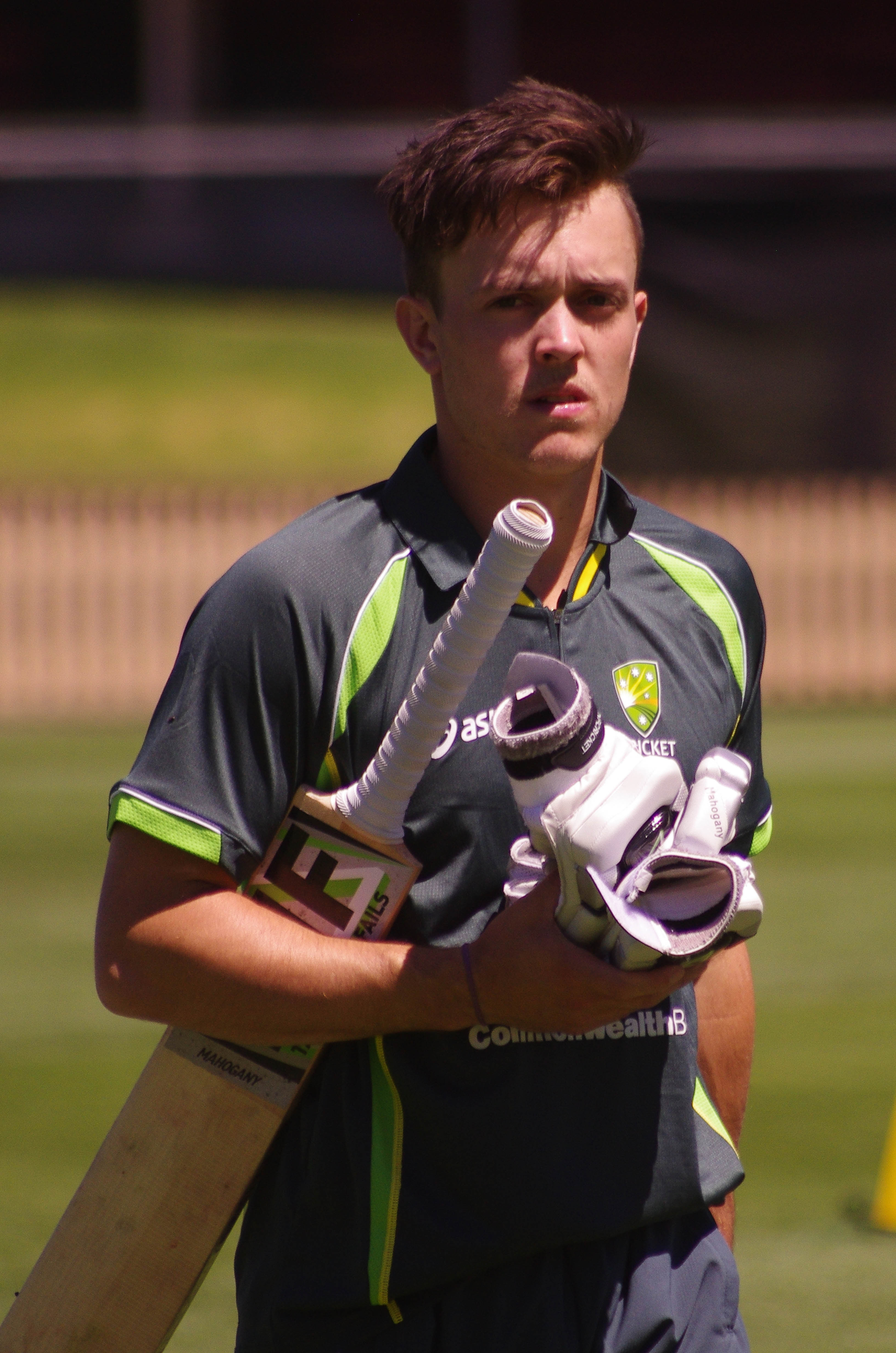 SEBASTIAN GOTCH